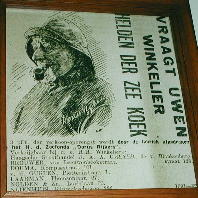 Uitsnede van foto gemaakt van reclameplakkaat voor koek met 3pct opbrengst als fondsenwerving voor het Helden der Zeefonds "Dorus Rijkers". Foto door Wybe van der Wal ( gemaakt 2004 in het Jan Lelsmuseum te Hoek van Holland en door hem vrijgegeven voor gebruik ondere GNU-FDL en Creative Commons BY-SA (Attribution, Share Alike) licenties. Uitsnede, bewerking en upload door Pudding4brains na e-mail overleg met W vd Wal.